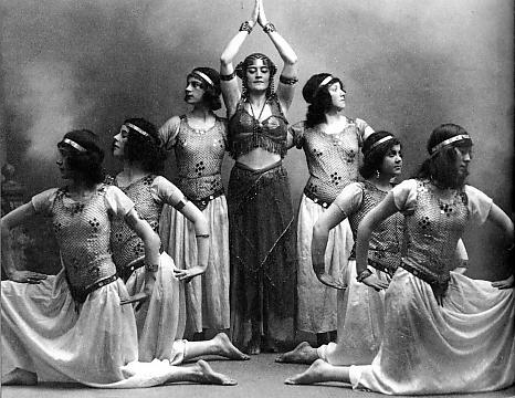 Kuvassa keskellä Maggie Gripenberg. Jalmari Lahdensuon ohjaama Peer Gynt oli valtava urakka Suomen kansallisteatterissa 1916. Puvut suunnitteli Venny Soldan-Brofeldt.